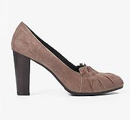 נעלי עקב צ'אנקי של חברת הנעליים "עמנואל" , צילומים: אפרת אשל.